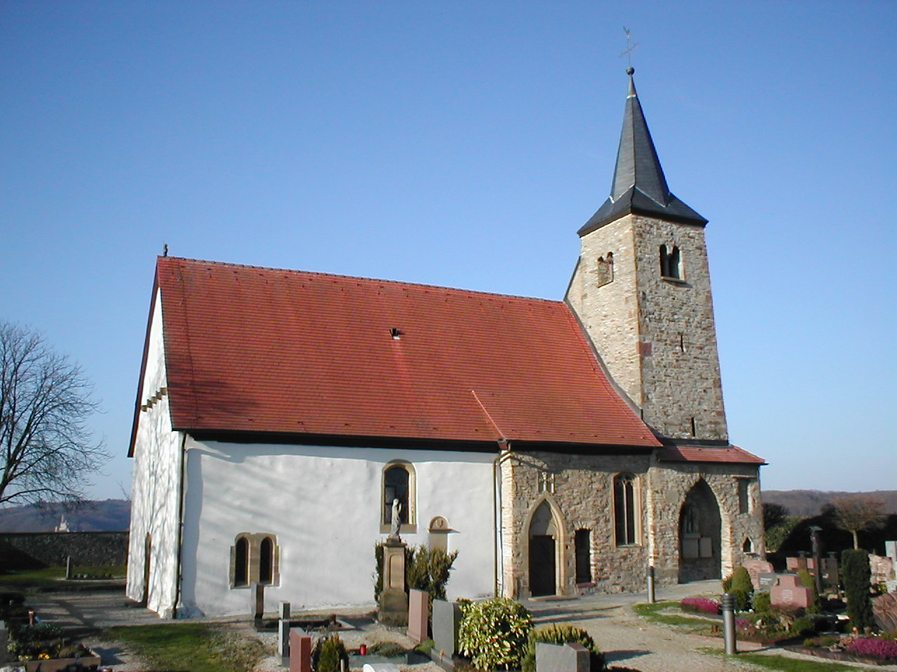 Michaelskapelle auf dem Michaelsberg in Gundelsheim (Württemberg), Ortsteil Böttingen